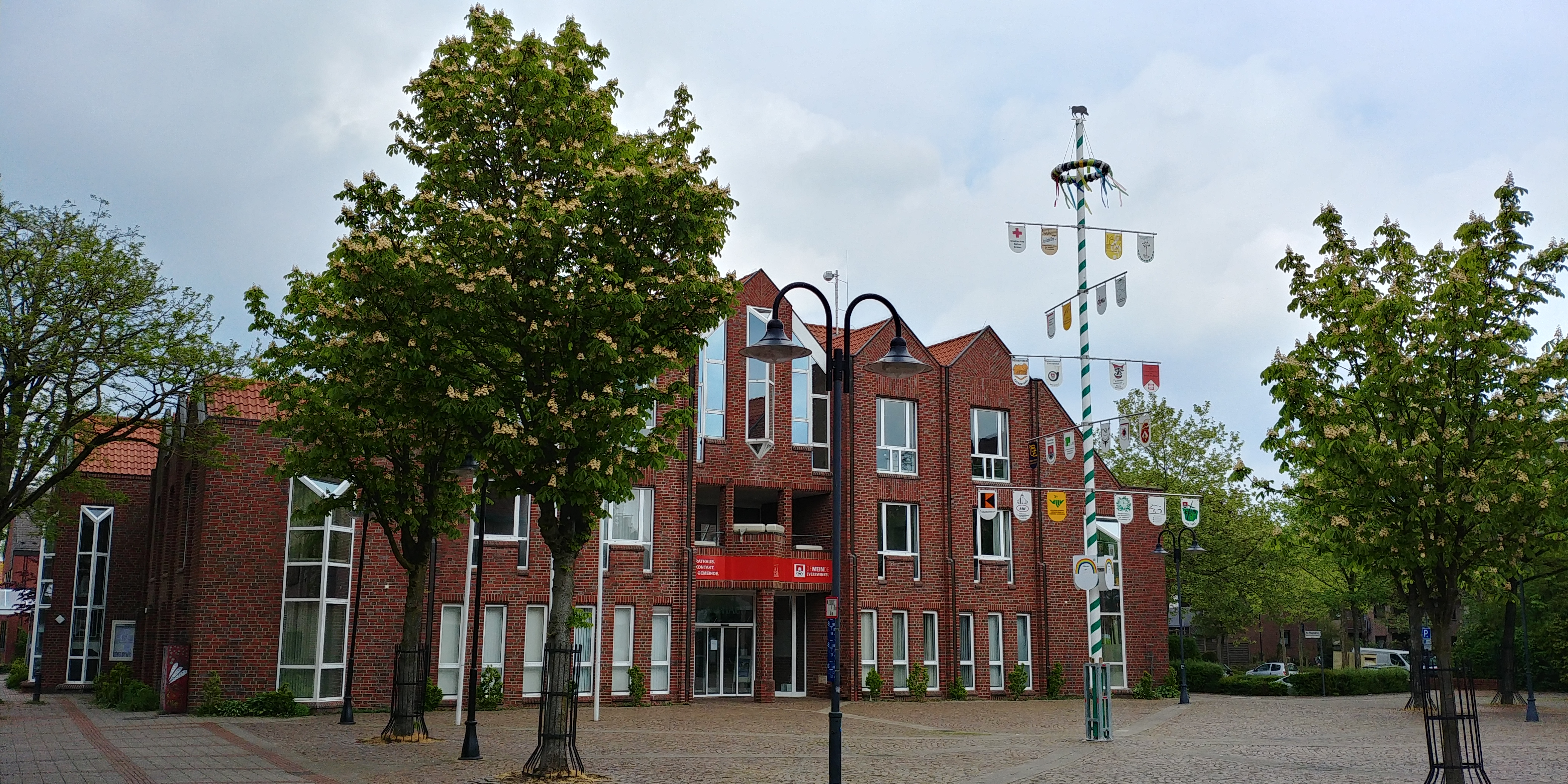 Das Rathaus von Everswinkel mit Maibaum.